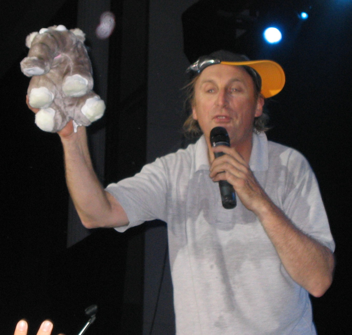 Otto Waalkes live in Freiburg im Breisgau